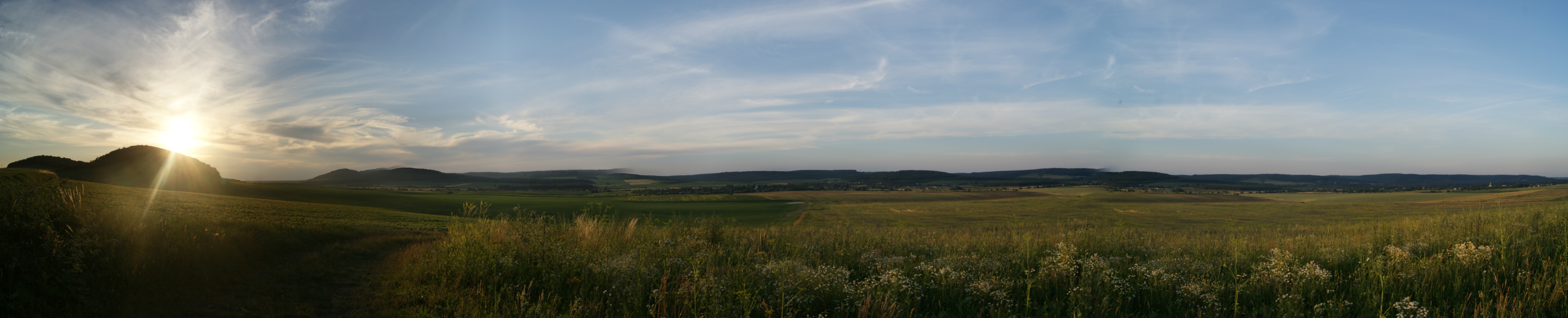 Панорама села Ушня з південного боку